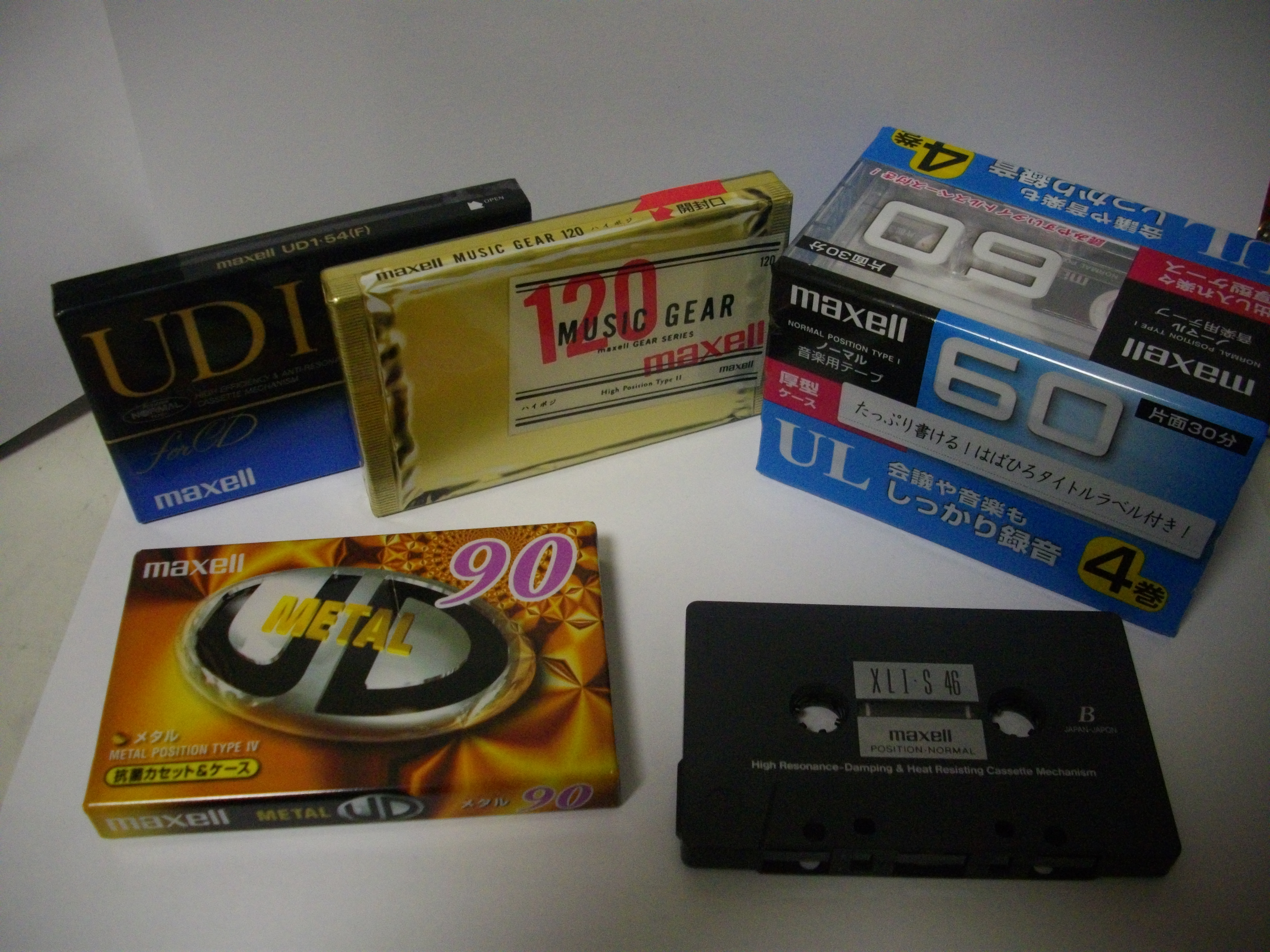 マクセル製のカセットテープ。左よりUD1、MG2、UL、UDメタル、XL1-S